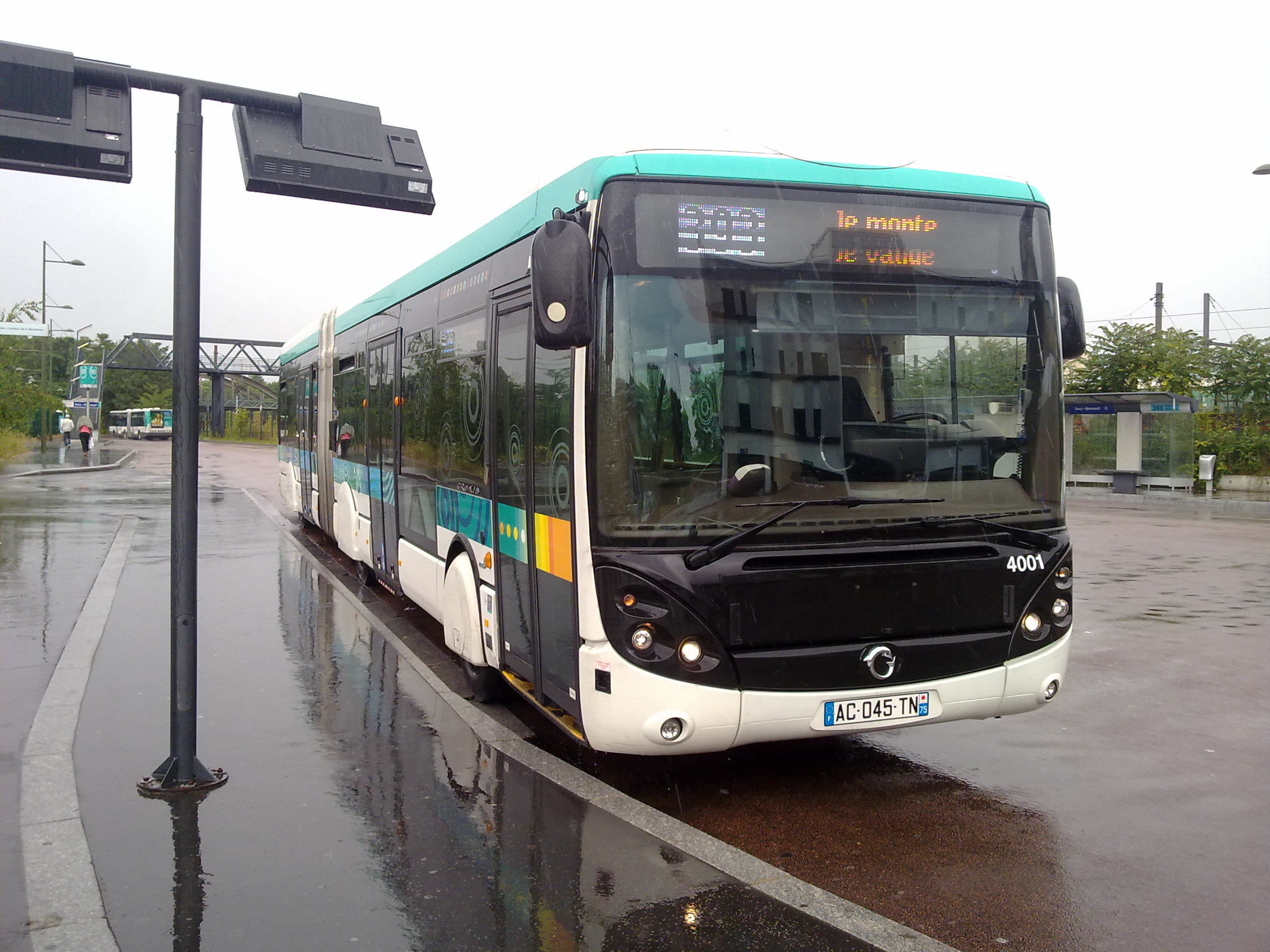 coté droit crealis 4001